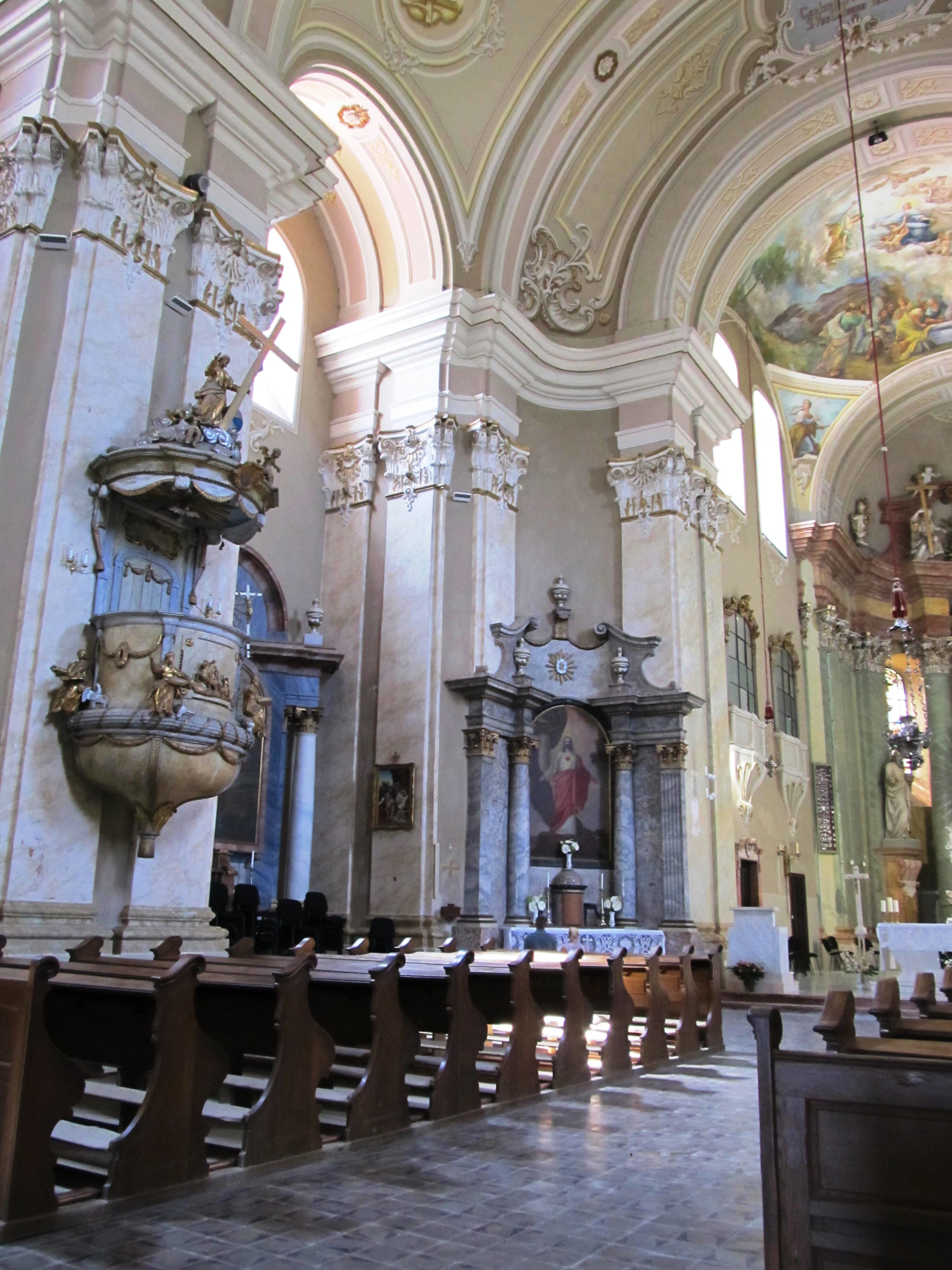 Innenansicht der Wallfahrtsbasilika Maria Radna in Lipova, Rumänien.